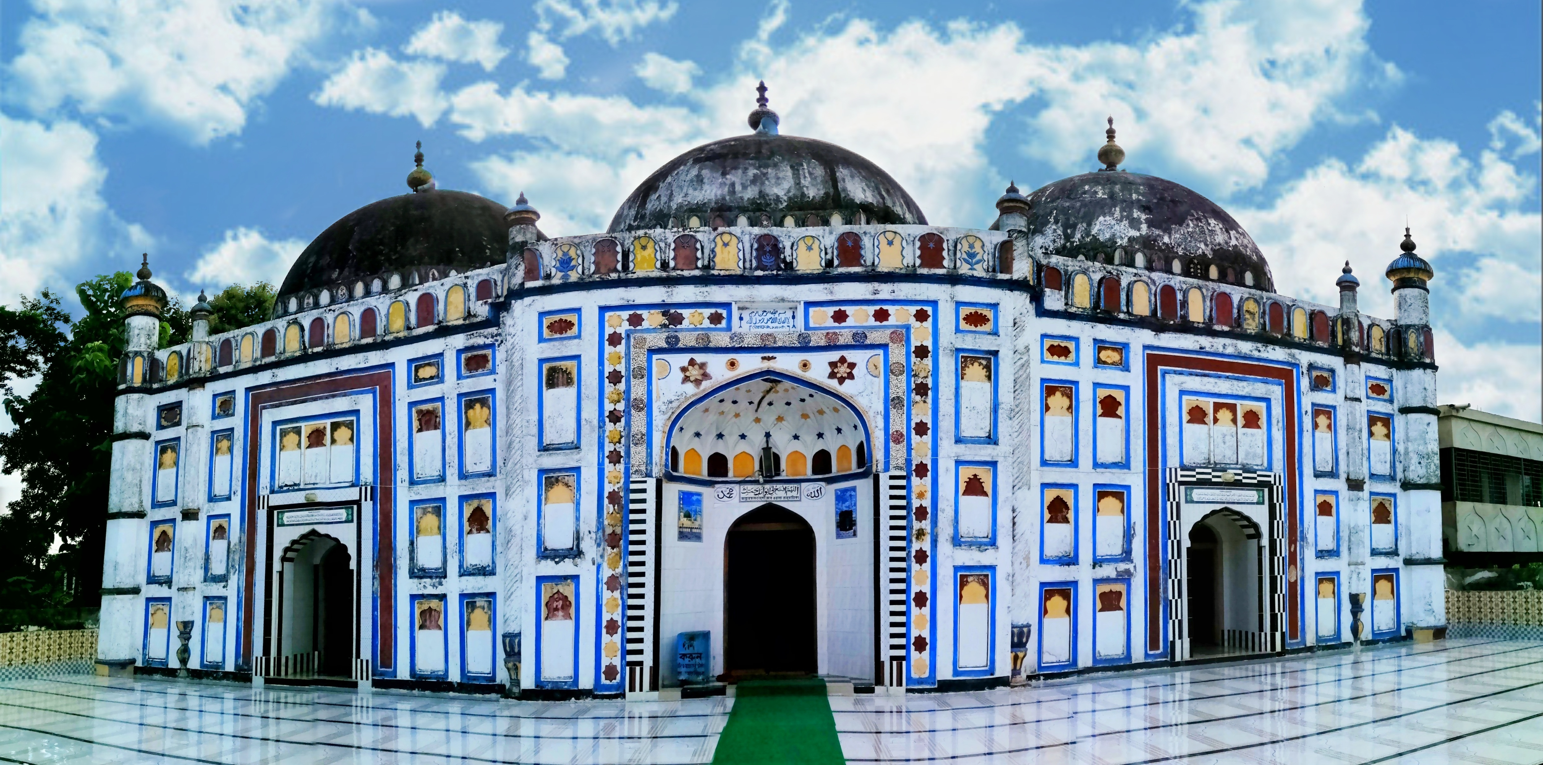 আড়িফাইল মসজিদ